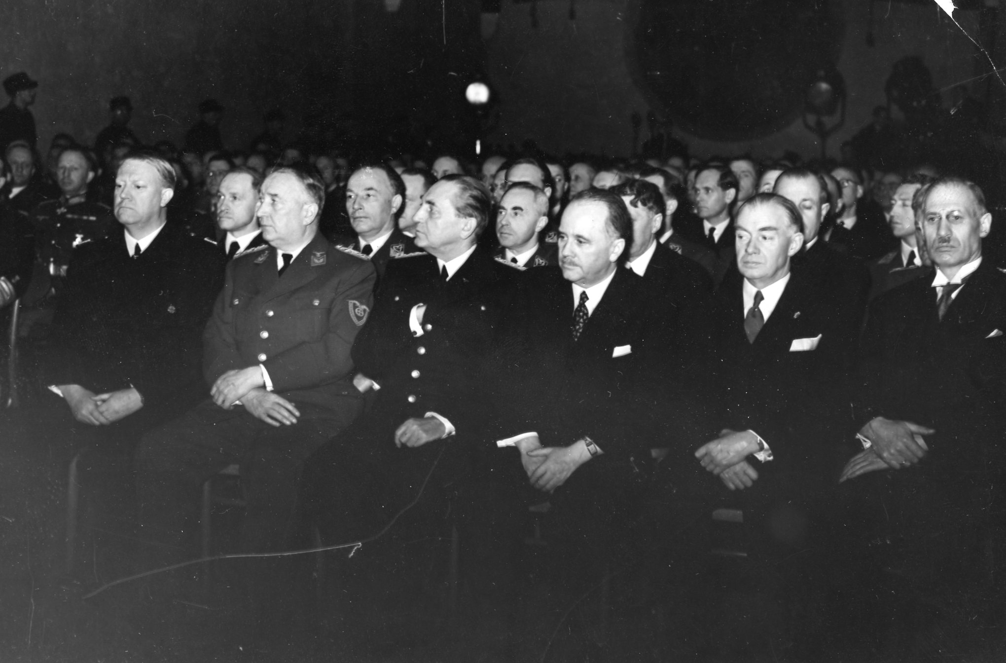 RA/PA-1209/Ue 94/ img063 «Statsakten» var en seremoni på Akershus slott i Oslo under andre verdenskrig 1. februar 1942 da rikskommissar Josef Terboven innsatte Vidkun Quisling, leder for Nasjonal Samling (NS), som «ministerpresident» i Norge, og de tyskkontrollerte kommissariske ministerne ble erstattet av «den nasjonale regjering» utgått fra NS. «Statsakten» markerte at Quisling fikk den formelle makta i Norge, og ved lov av 12. mars 1942 ble NS «statsbærende parti». Quisling hadde håp om at ordninga også skulle gi NS reell makt og føre til fred mellom Norge og Tyskland, men tysk tilsynsforvaltninga gjennom Reichskommissariat Norwegen fortsatte som før inntil frigjøringa 8. mai 1945.